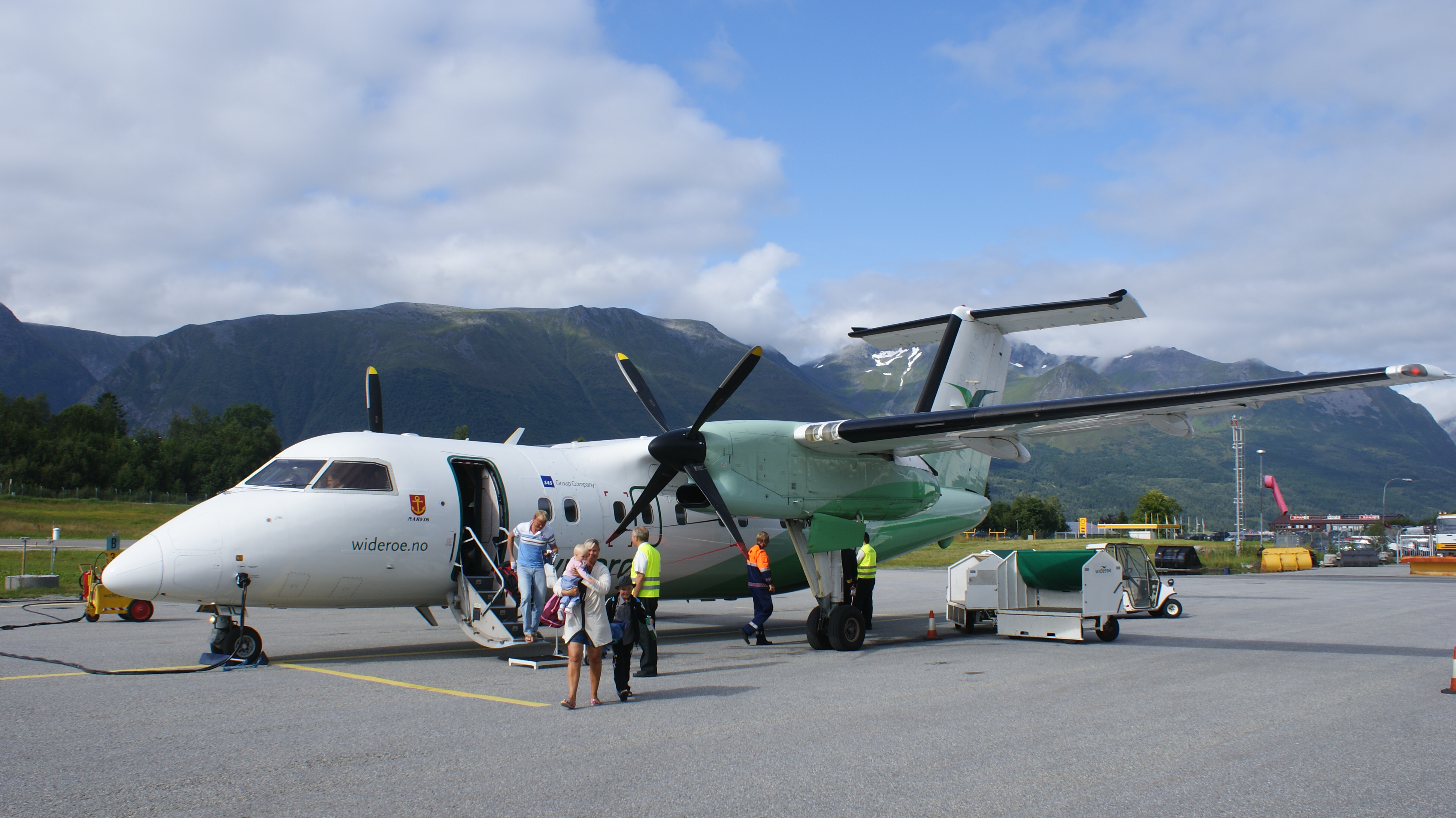 Widerøe de Havilland Canada Dash-8 103 at Ørsta-Volda Airport, Sunnmøre, Møre og Romsdal, Norway.